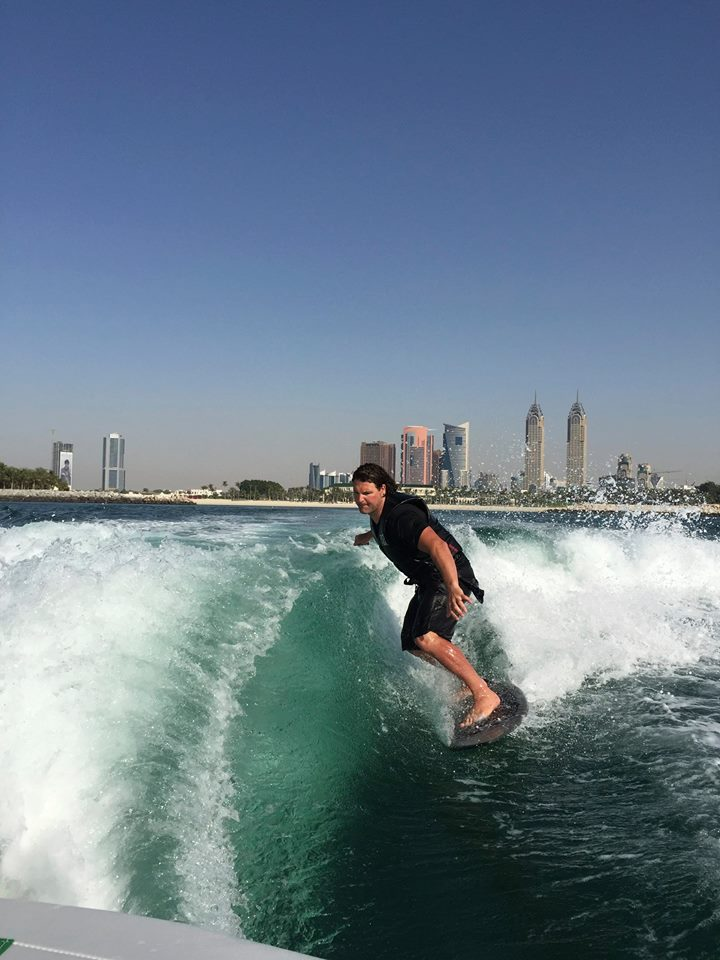 G25 wave